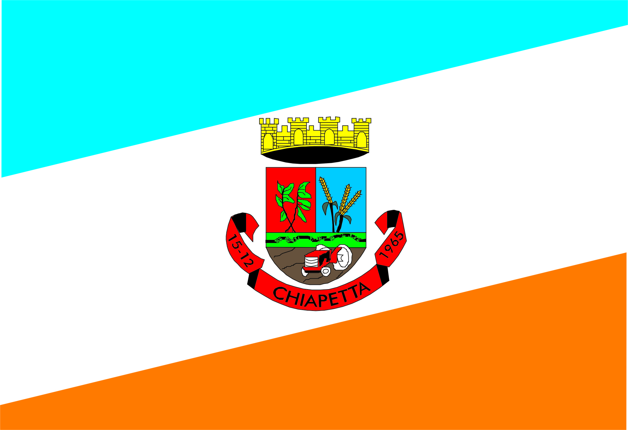 bandeira municipio de chiapetta